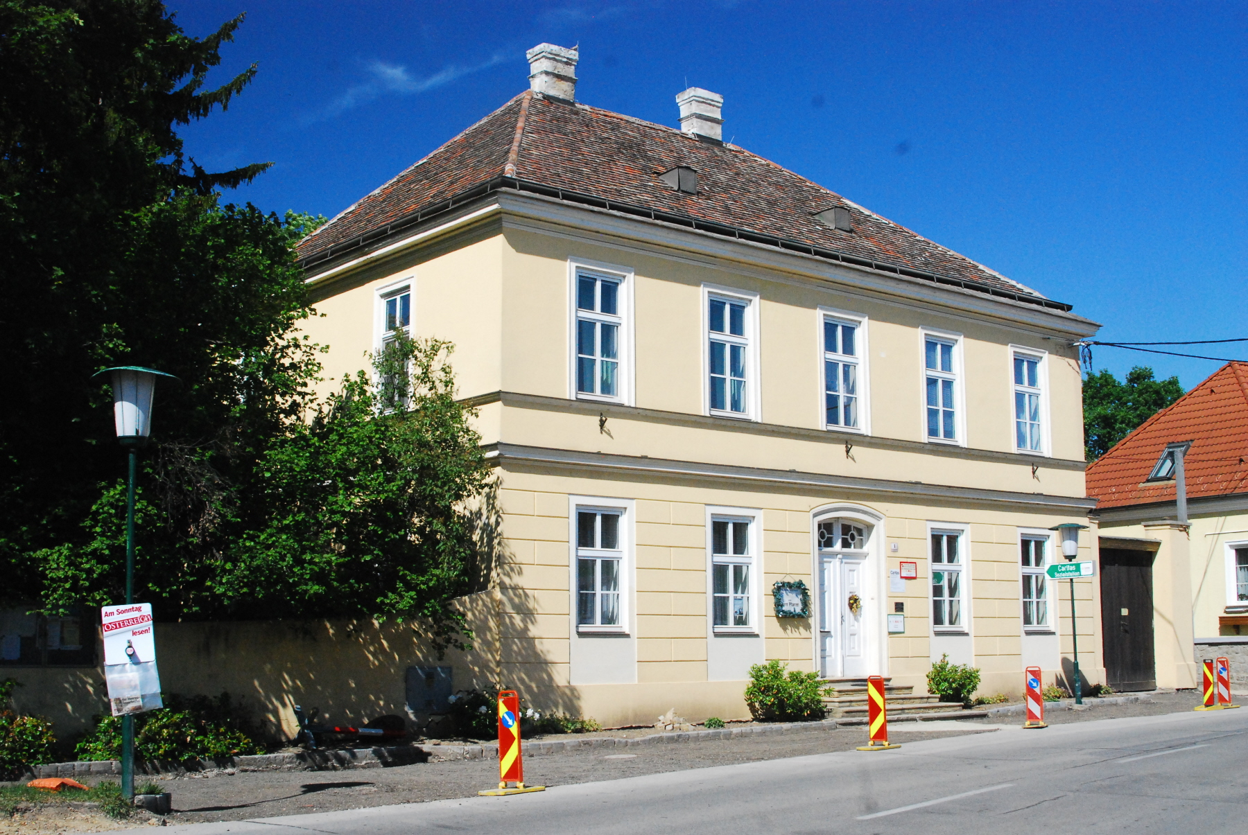 Pfarrhof